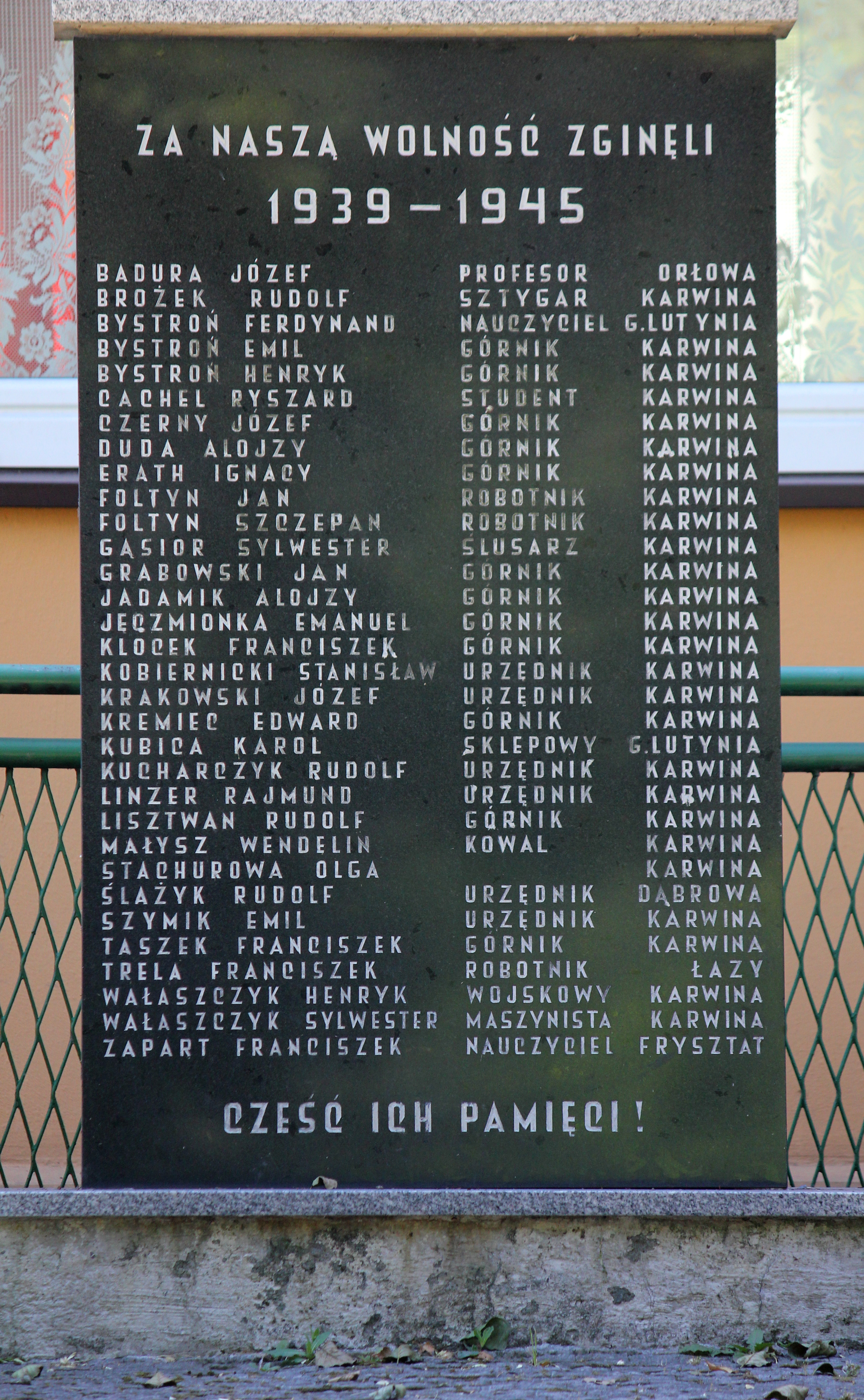 Česky: Památník padlým u budovy PZKO v Karviné-Ráji.